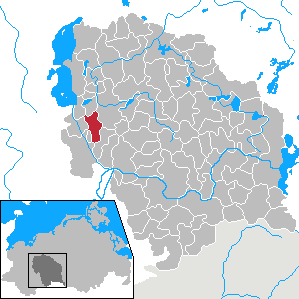 Sukow in Mecklenburg-Vorpommern - District Parchim